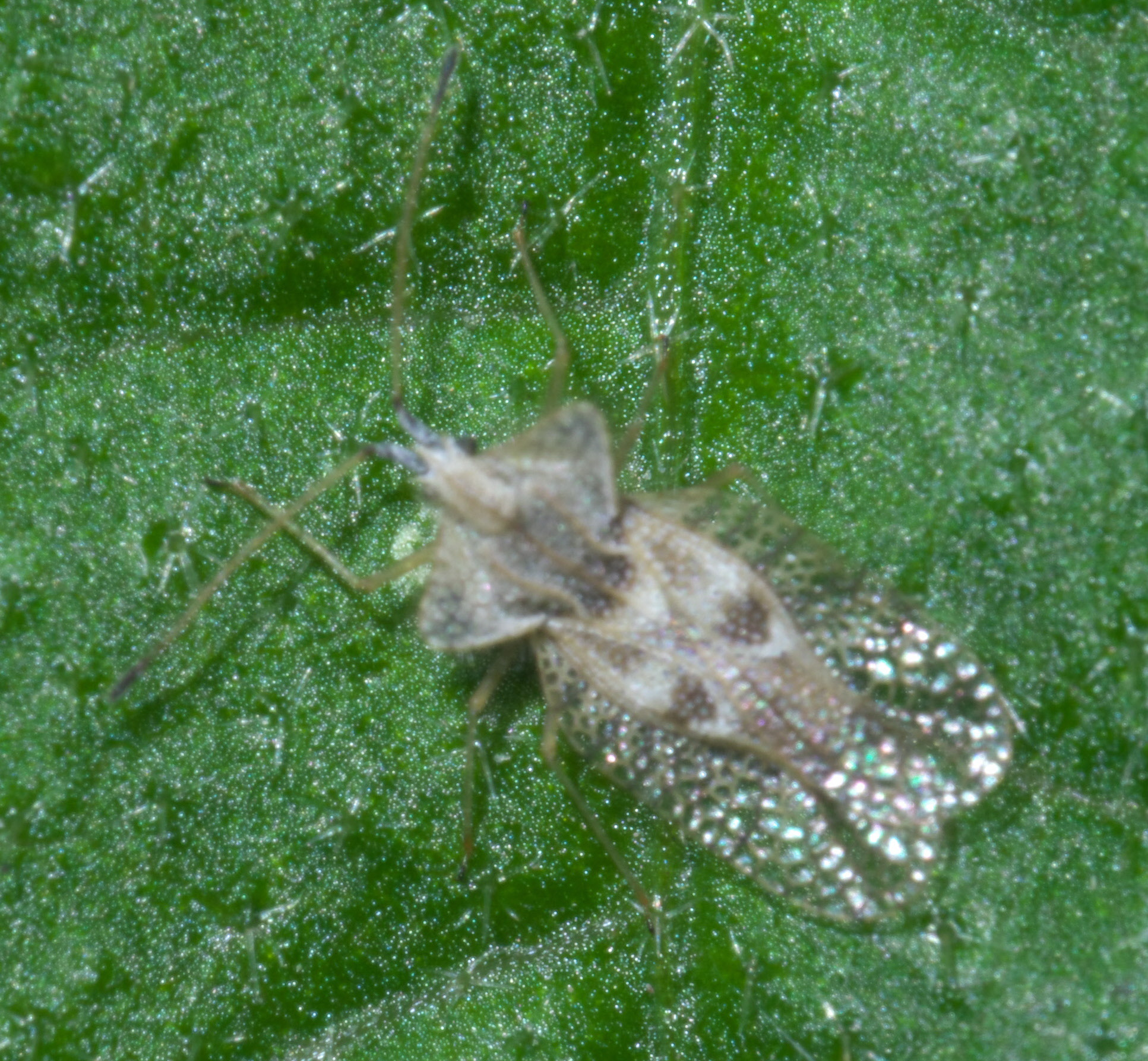 Gargaphia solani, eggplant lace bug, ID Confidence: 98